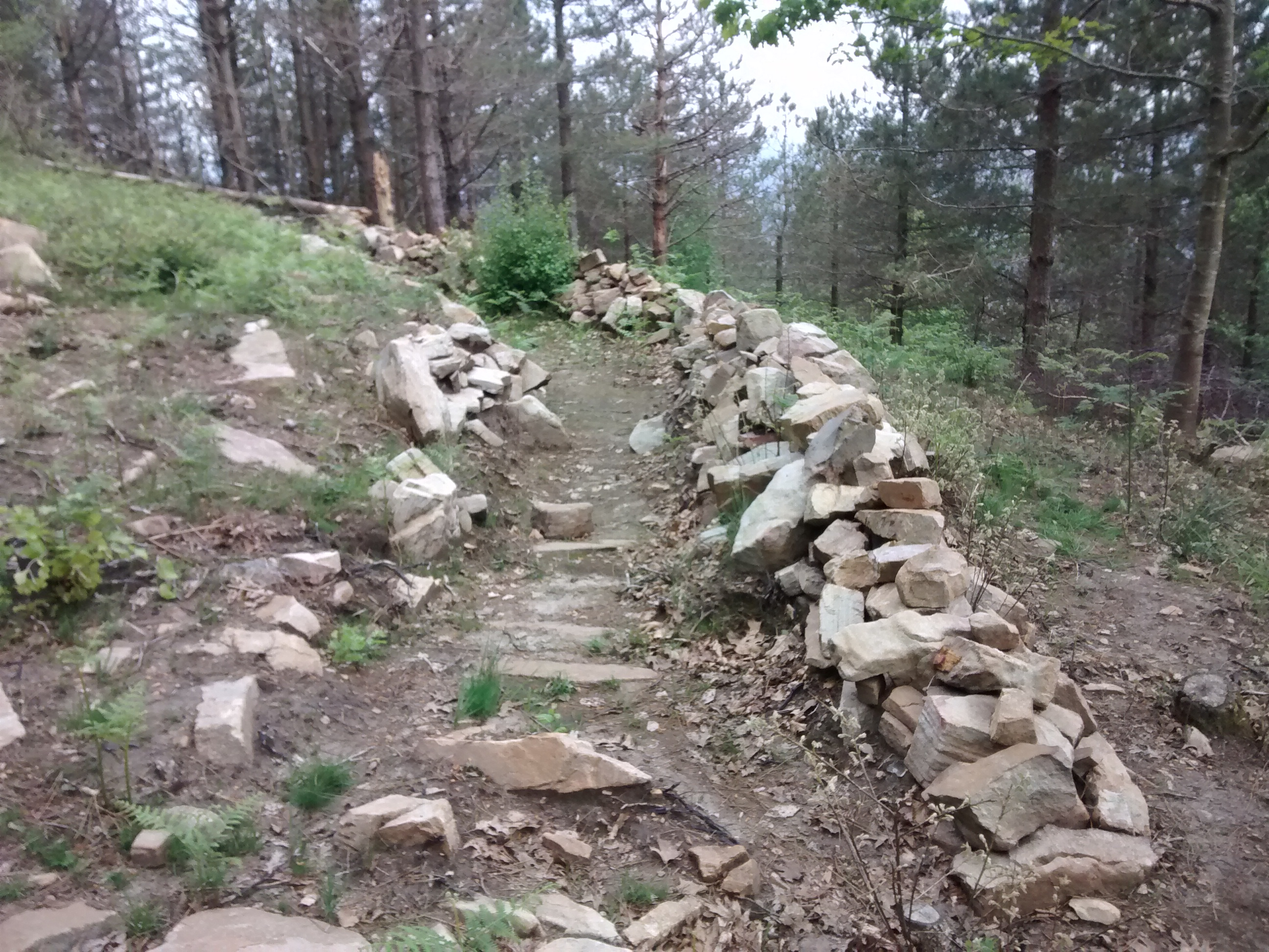 Belkoaingo mendebaldeko tontorretik gertu dagoen harresia. Ustez lubaki bezala erabili zuten Gerra Zibilean.